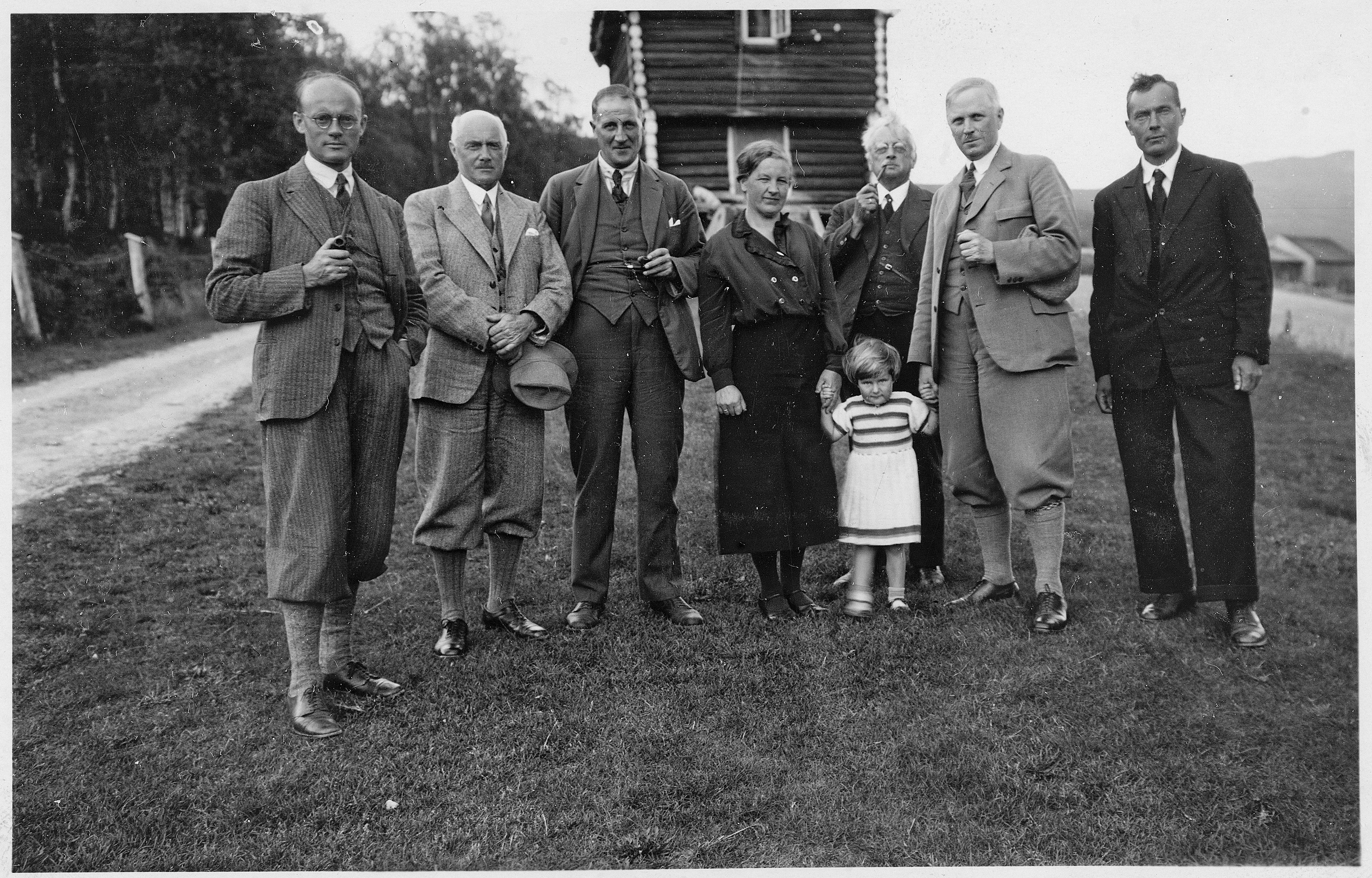 Bildet er hentet fra Arkivverket. Medlemmer av Høyfjellskommisjonen og lokalbefolkning fotografert i forbindelse med kommisjonens arbeid. Her hjemme hos kommisjonsmedlem Bjøntegaard. Arkivinstitusjon : Riksarkivet Arkivnavn : Høyfjellskommisjonen Sted : Norge, Hedmark, Rendalen, Hanestad Emneord: Allmenningsgrunn, Fjell, Fjellandskap, Høyfjell, Høyfjellsgrunn, Særdomstol Avbildet